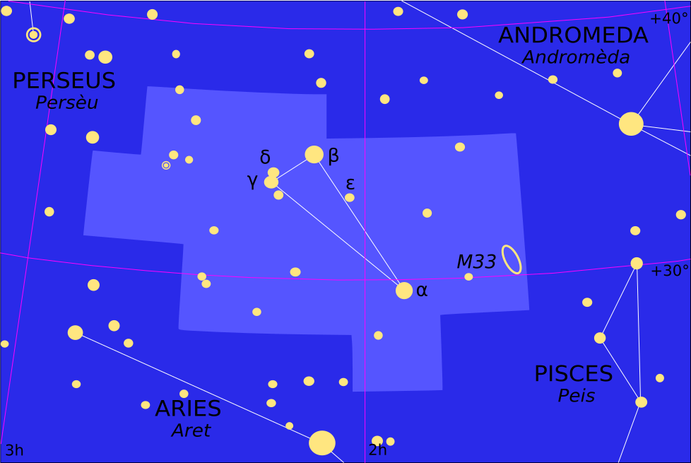 Representacion de la constellacion dau Triangle.